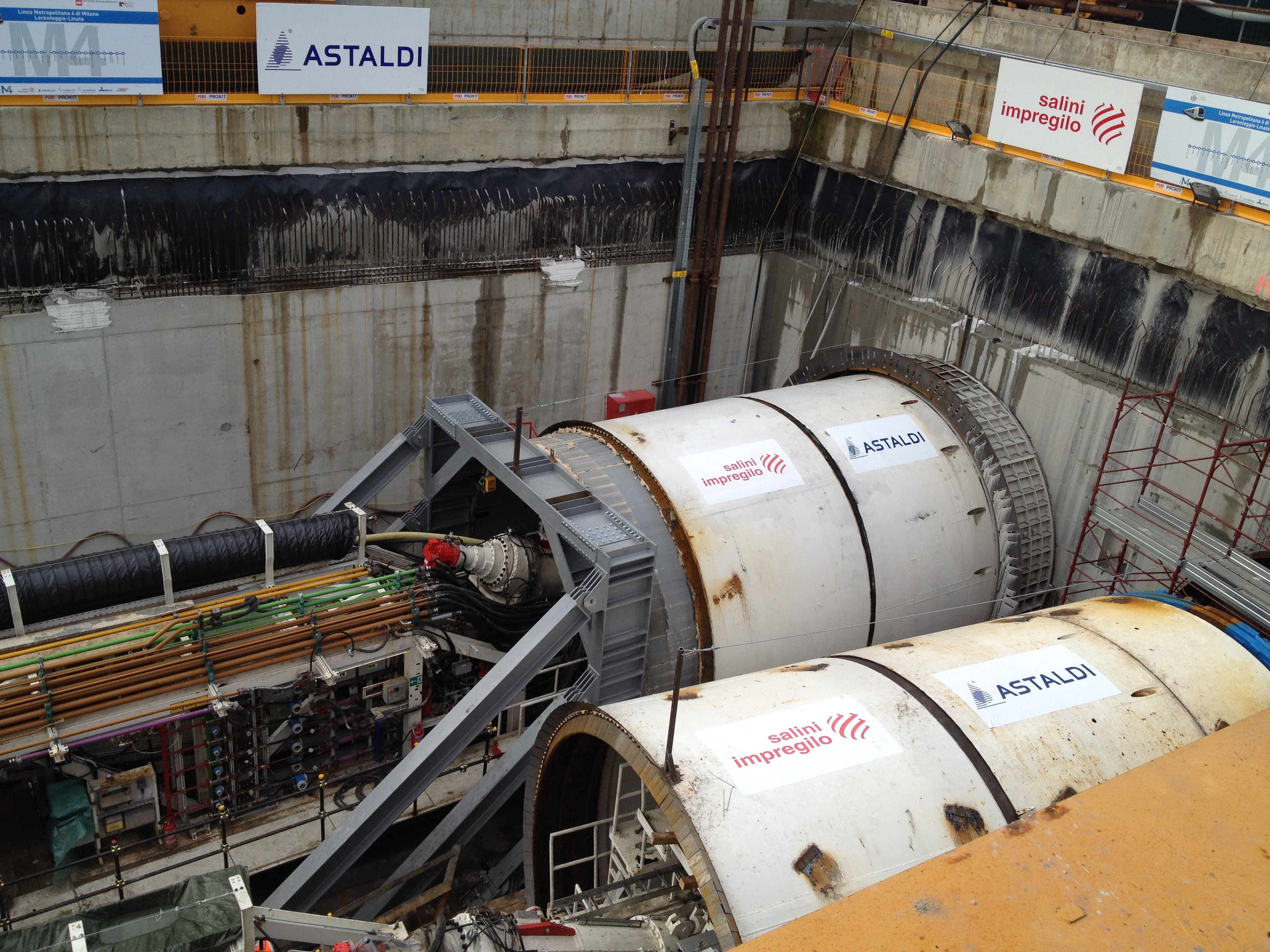 maurizio lupi inaugura metropolitana m4 talpa linate 24 marzo 2014 2